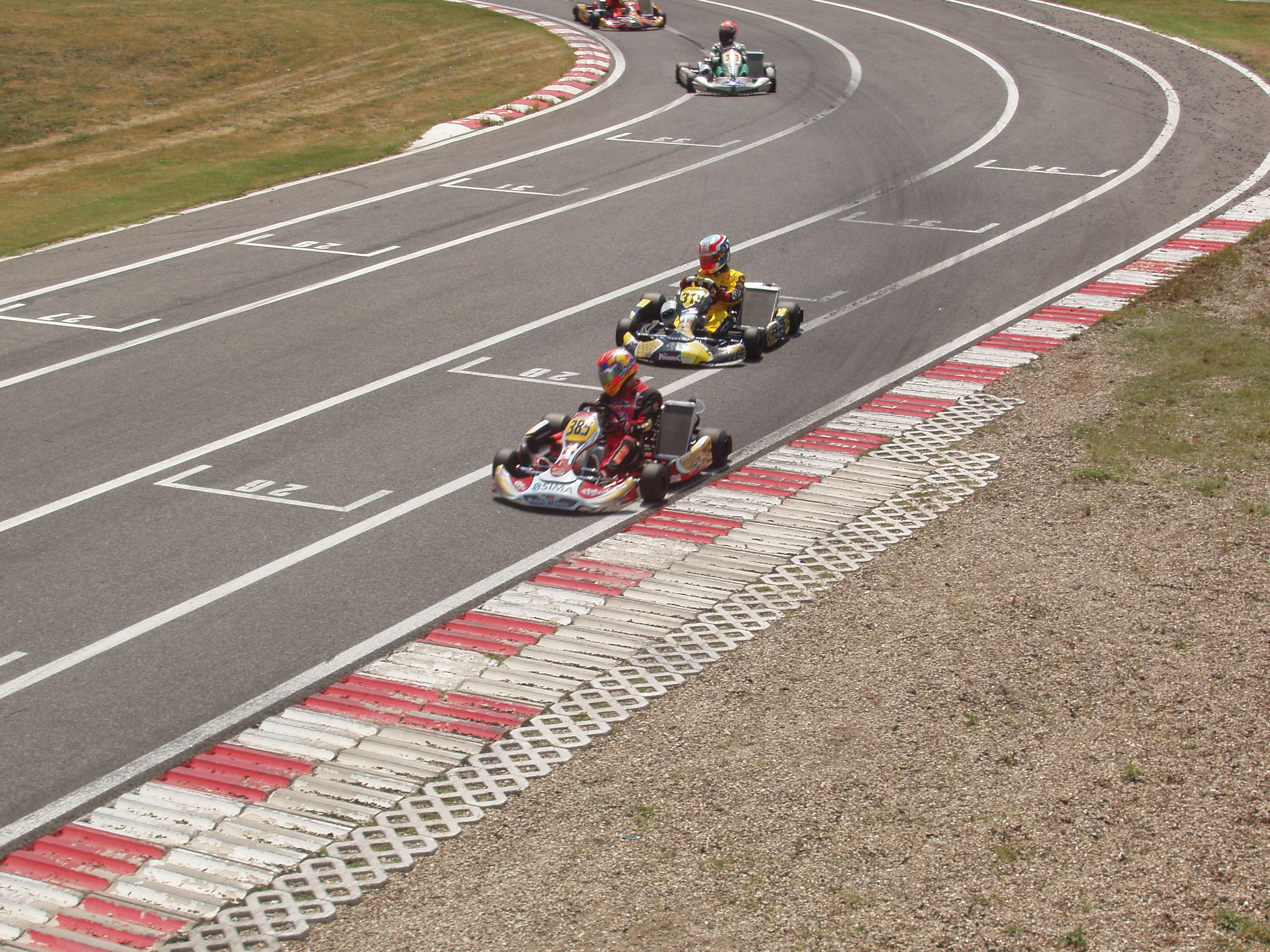 Un passaggio durante una gara sul rettilineo iniziale.